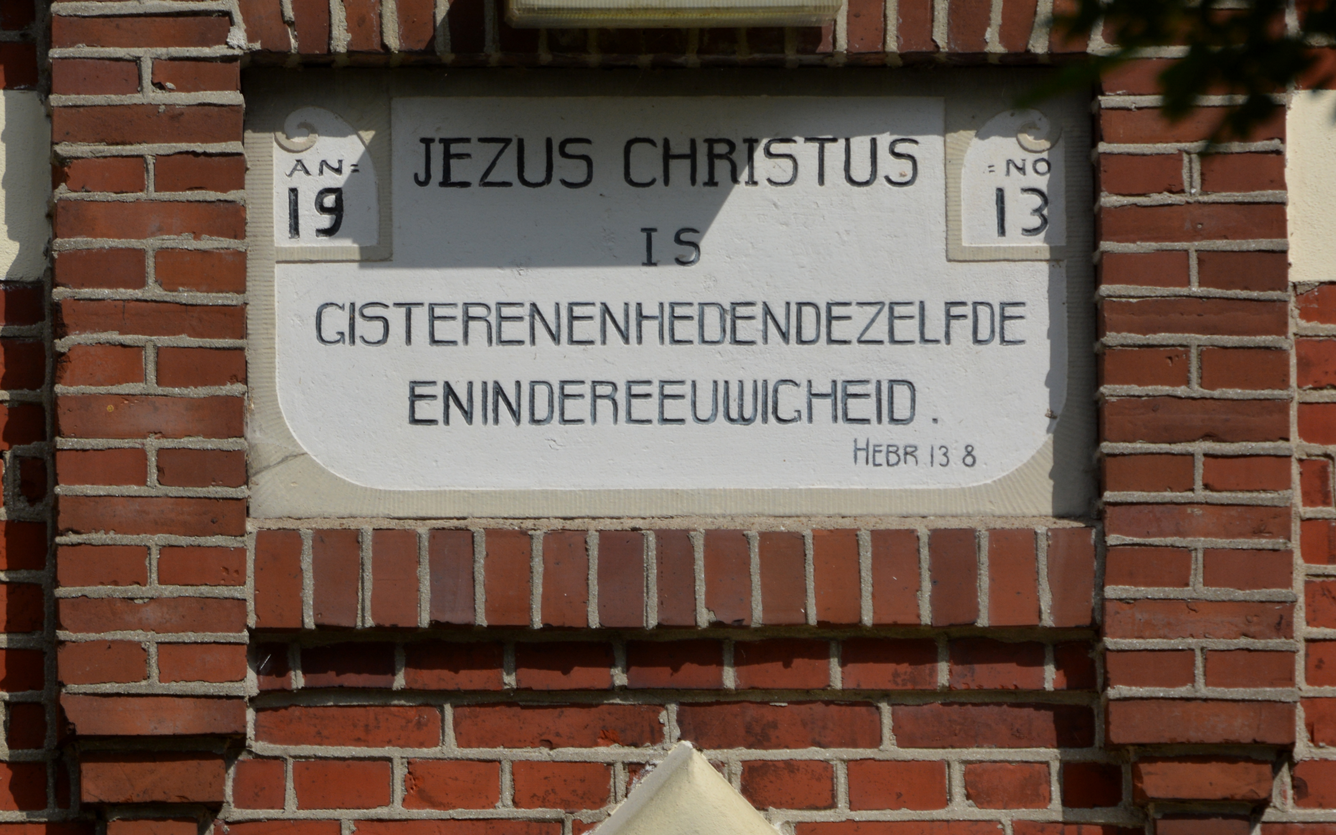 Harkema, geref. kerk (VGKN), gevelsteen